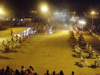 Agremiação Mocidade